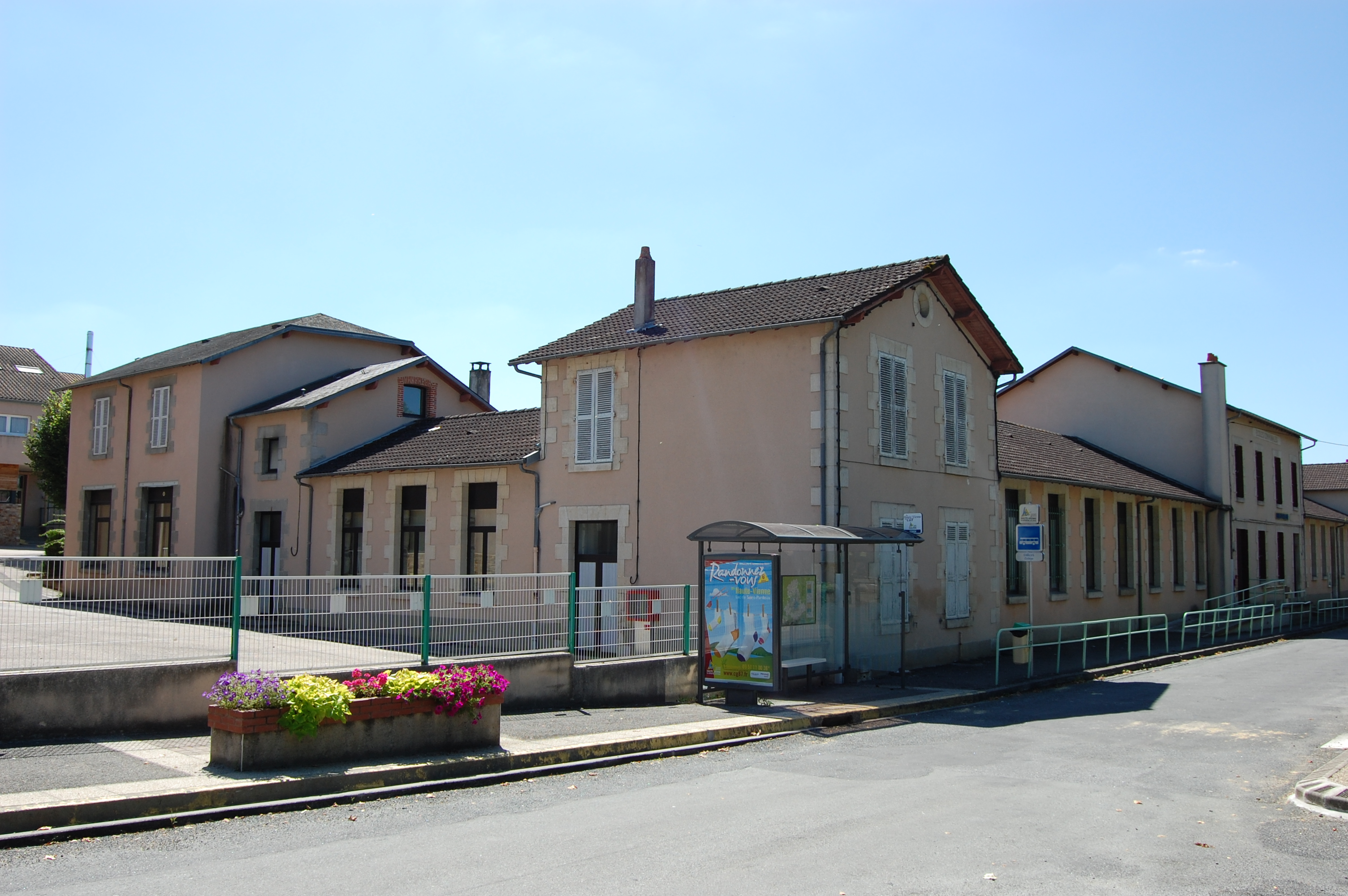 Châlus, Haute-Vienne, Ecole élémentaire